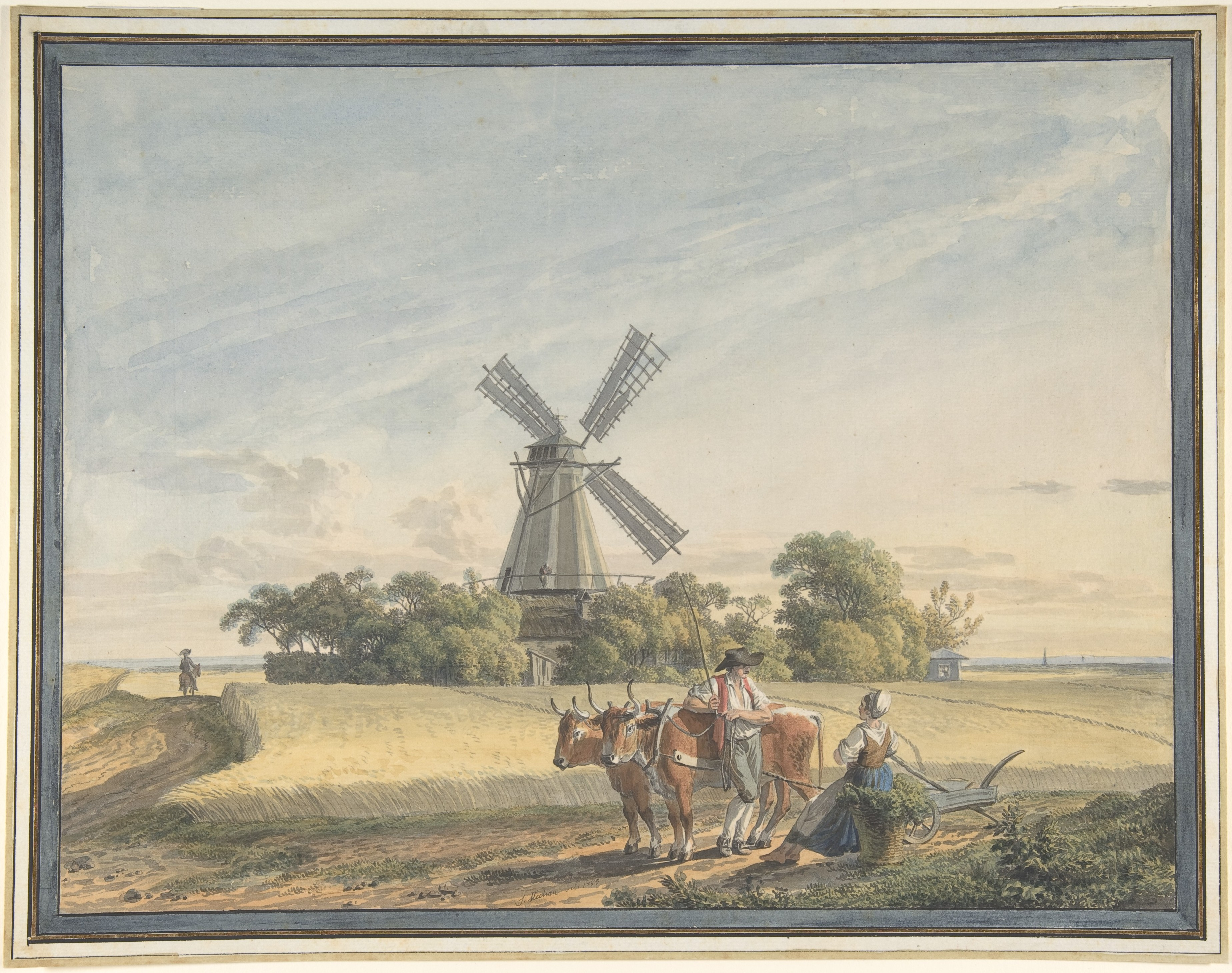 Drawing; Drawings